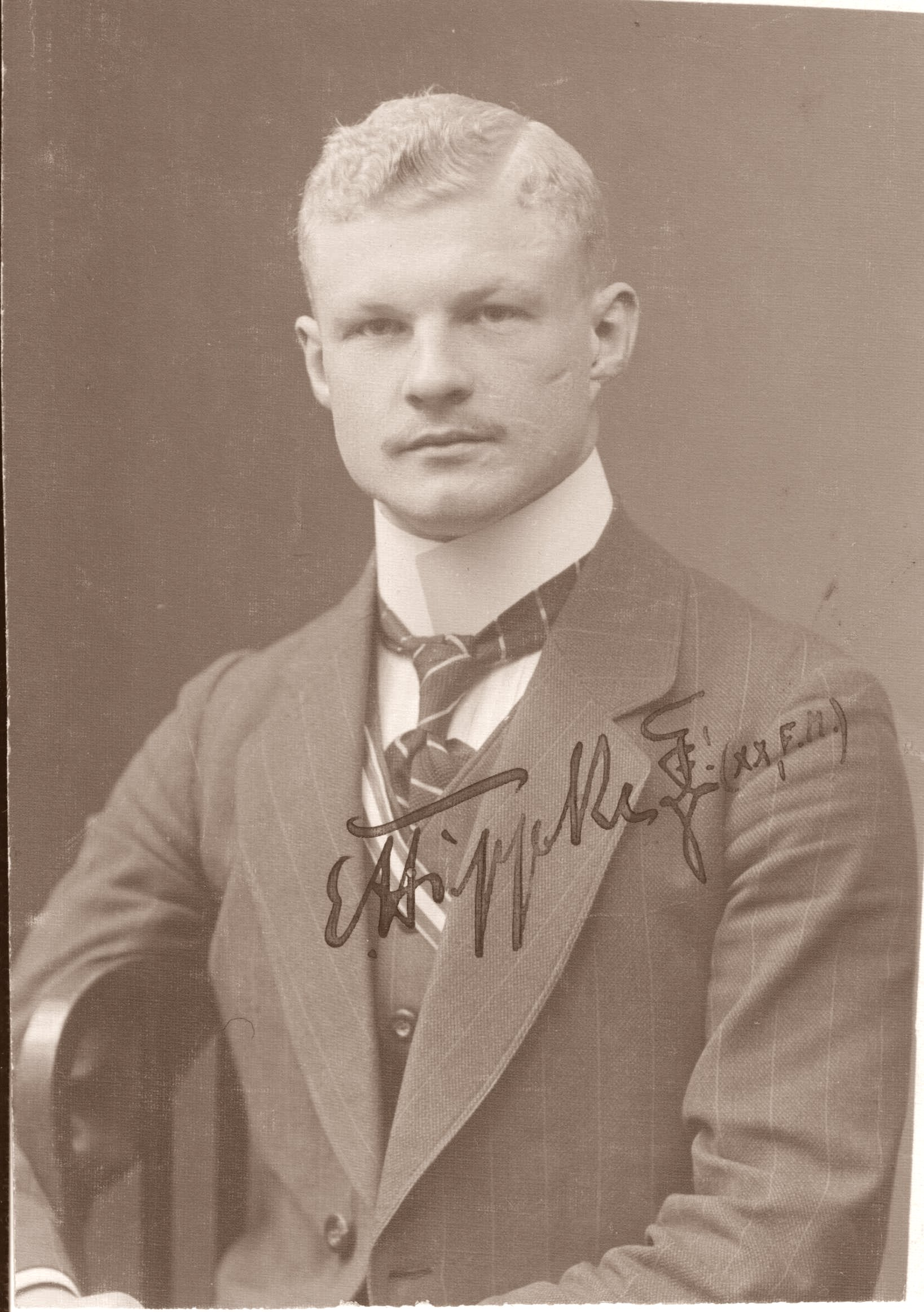 Erich Hippke als Student an der Kaiser-Wilhelms-Akademie für das militärärztliche Bildungswesen und Angehöriger des Corps Franconia Berlin im Militärärztlichen Senioren-Convent.